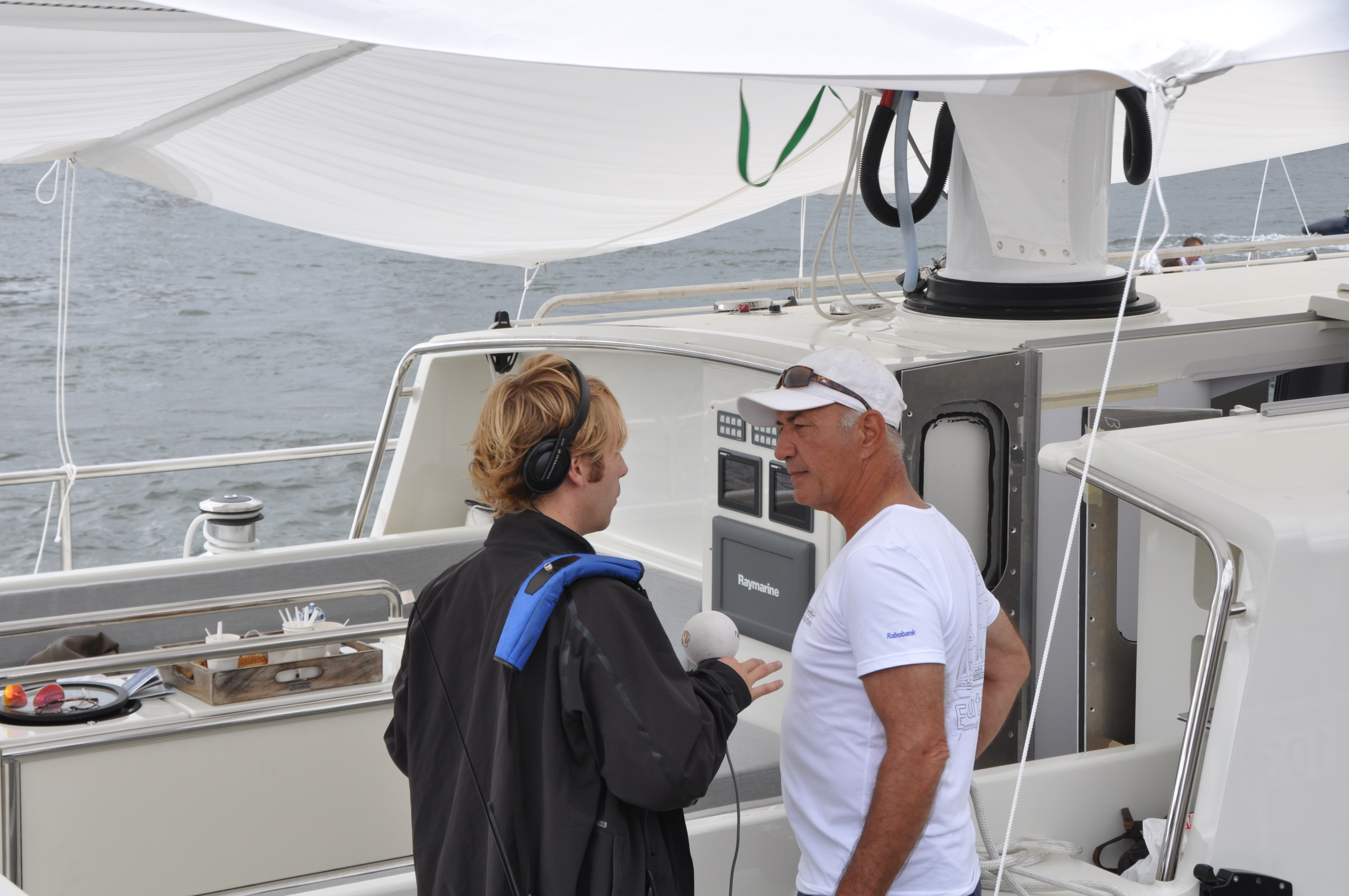 De ECOLUTION van Wubbo Ockels op SAIL Amsterdam 2010.